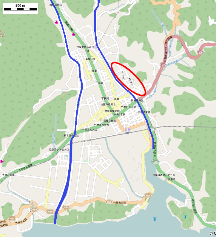 2015年現在の地図に竹原町並み保存地区を示したもの。左の下線が賀茂川、右が本川。 This map may be incomplete, and may contain errors. Don't rely solely on it for navigation.